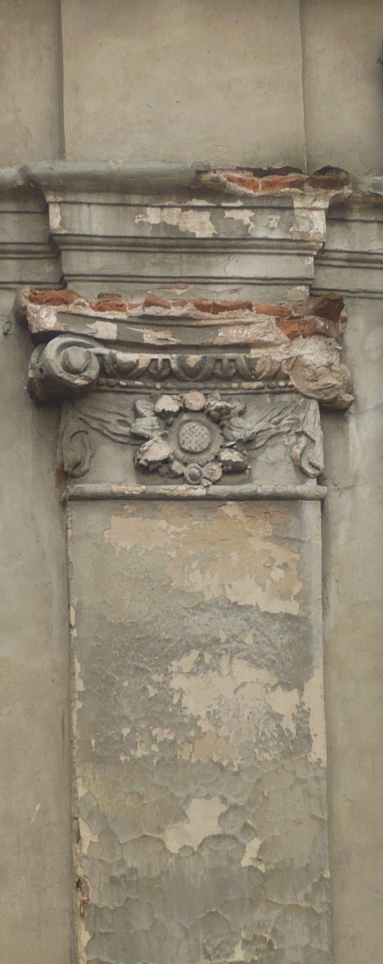 Sarny. Pilaster